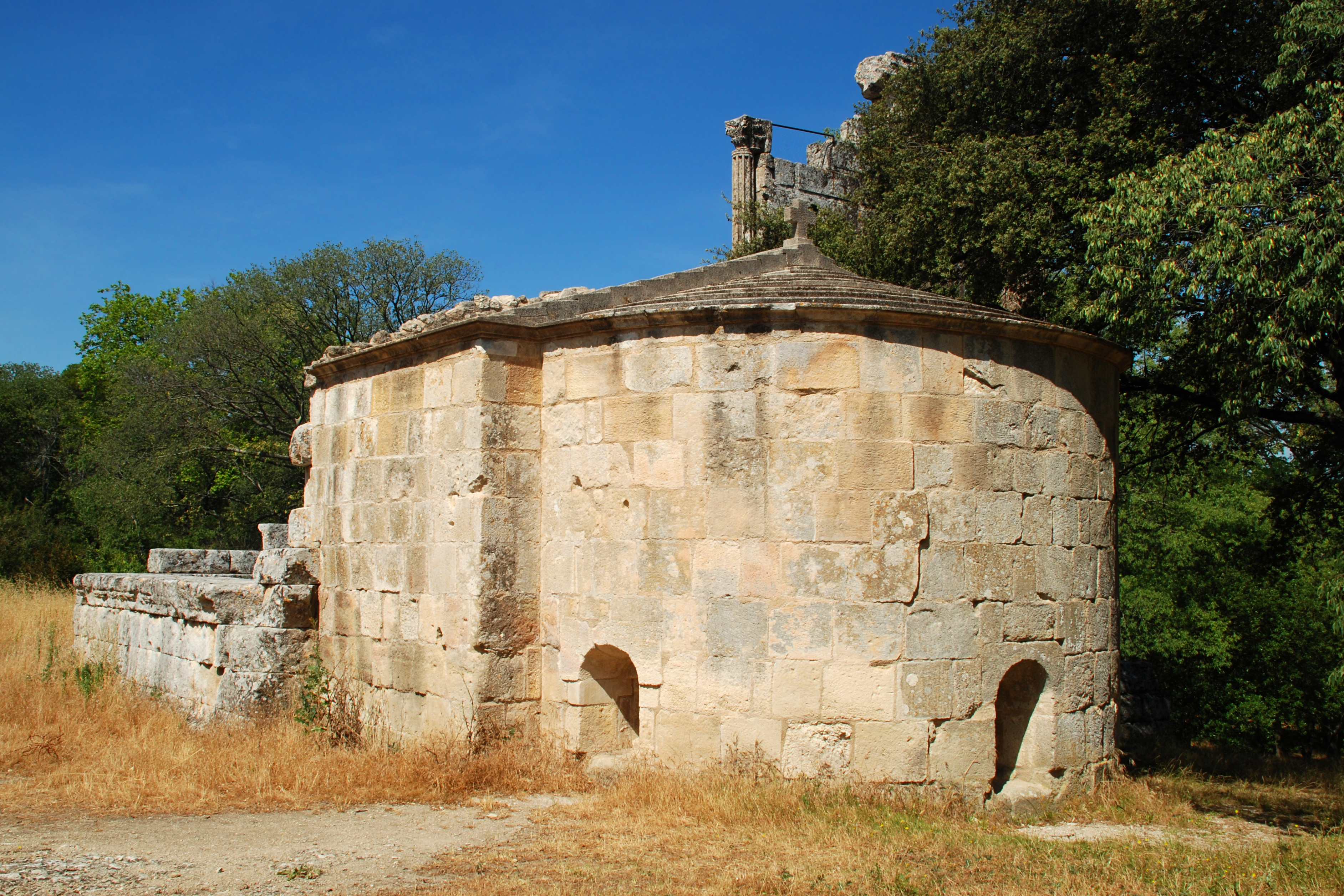 France - Provence - Bouches-du-Rhône - Vernègues - Chapelle Saint-Cézaire de Château-Bas